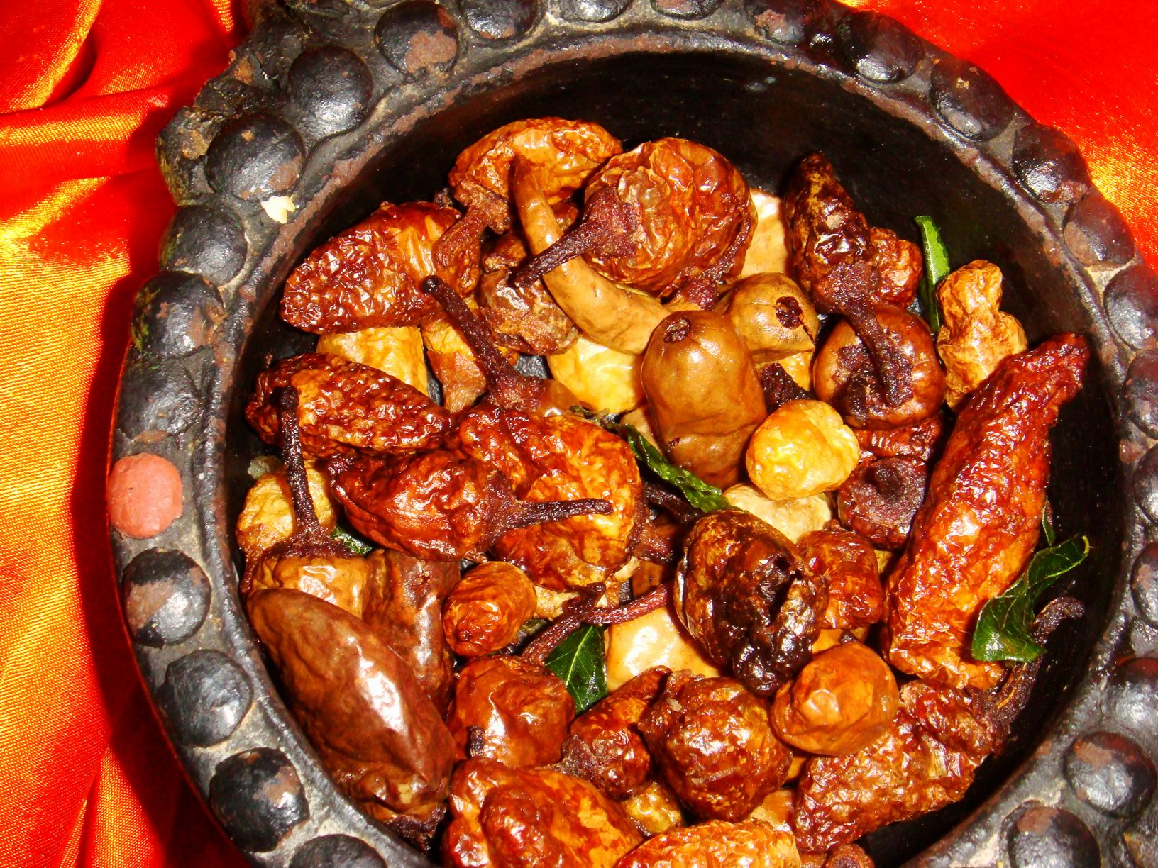 അങ്കമാലി സൂര്യ ഹോട്ടലിലെ ബൂഫേയിൽ നിന്ന്.